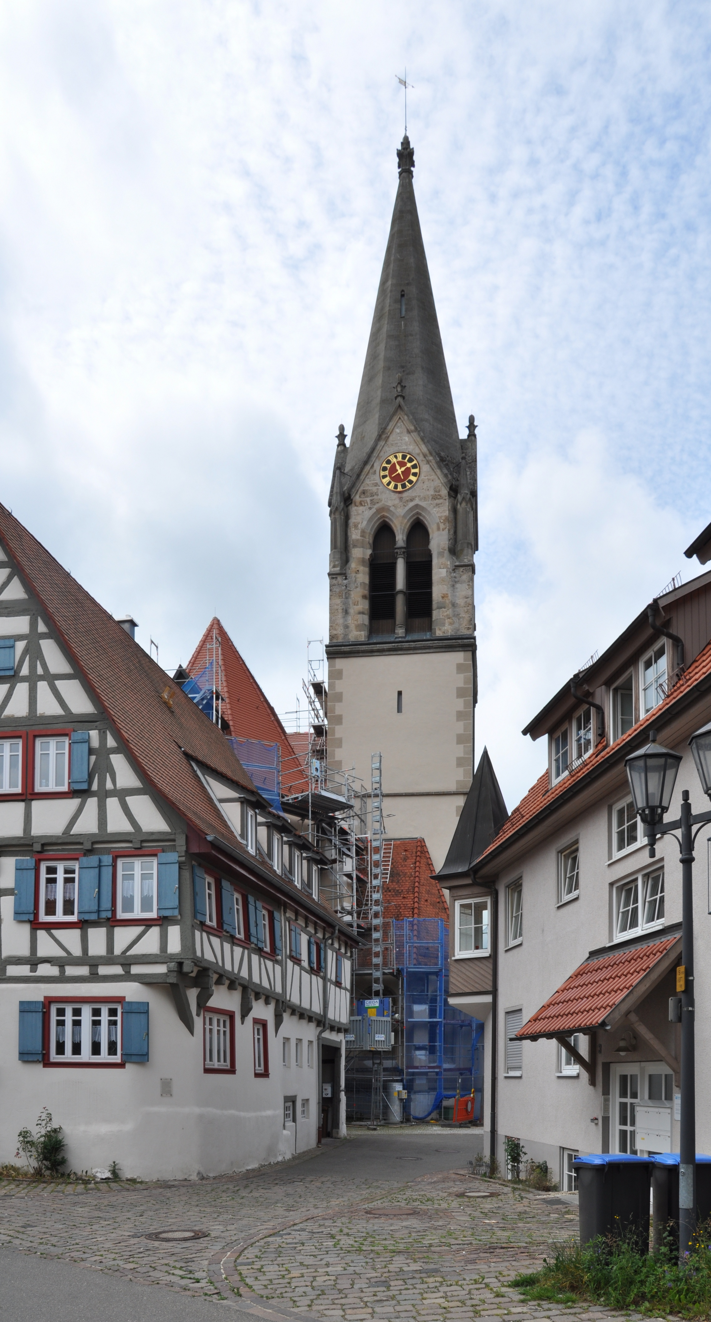 Münsingen, Fachwerkhaus Beim Großen Haus 3 (links), Kirchturm der Martinskirche